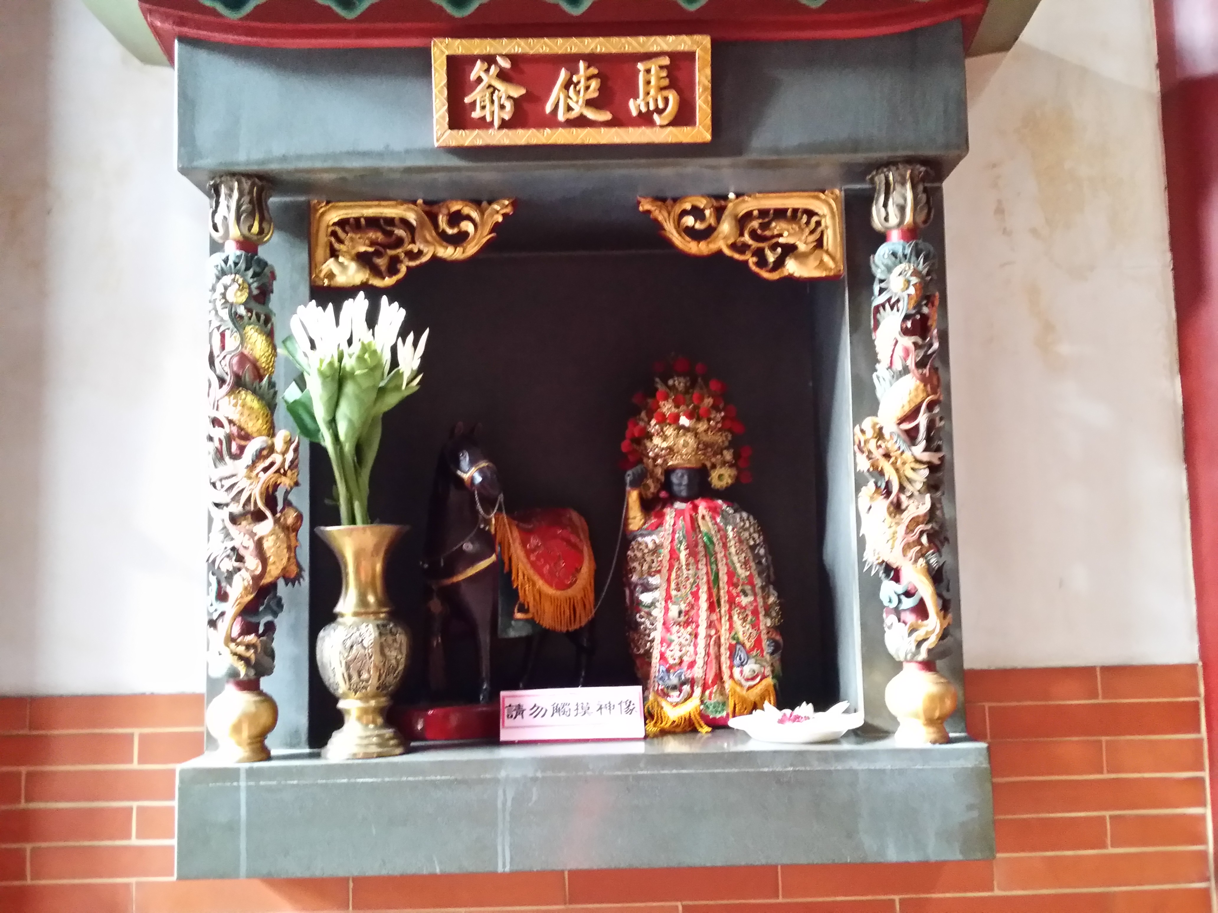 開基武廟原正殿配祀-馬使爺